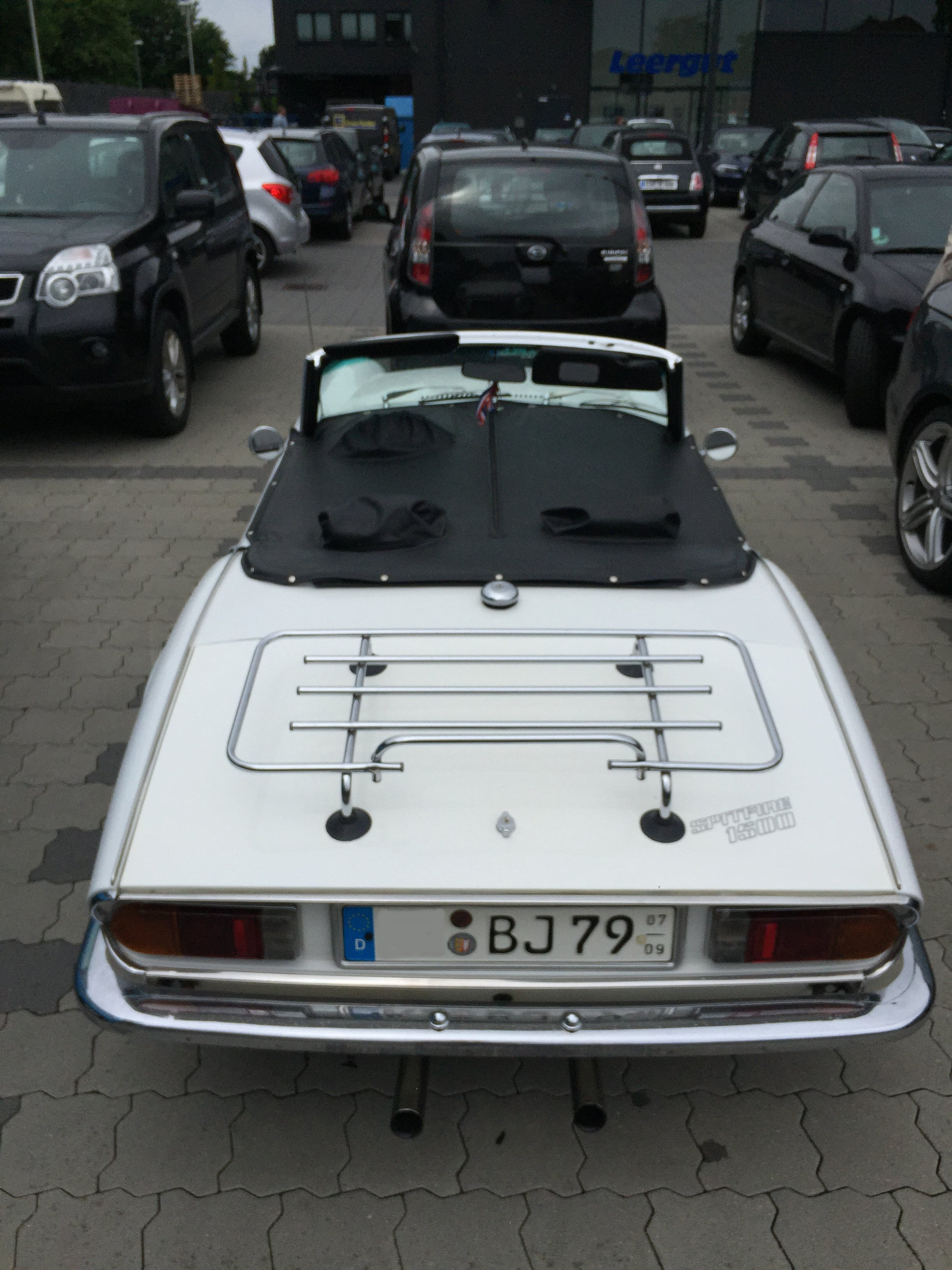 Triumph Spitfire 1500 (1979) mit geschlossenem Wetterschutz